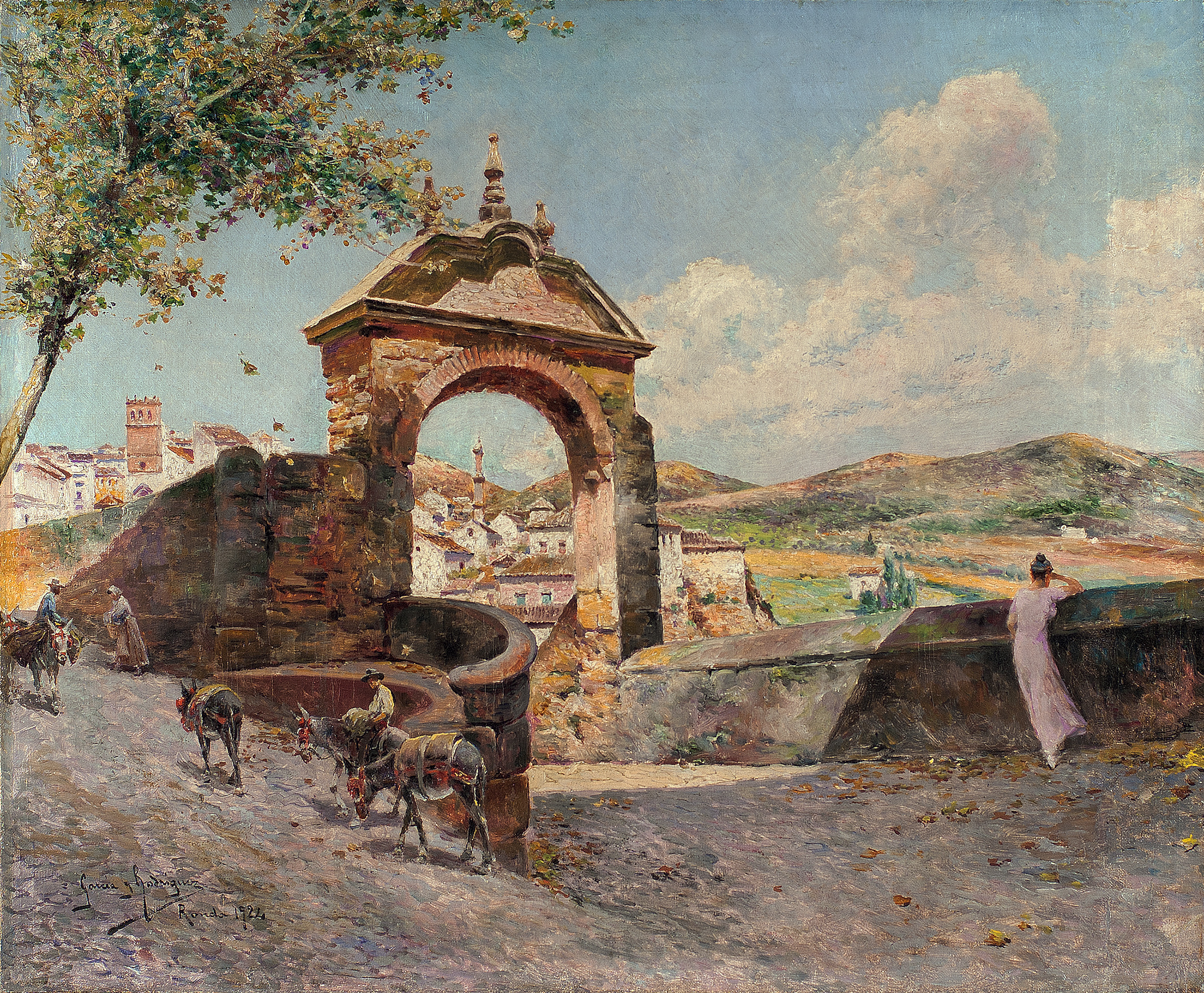 Ronda. Museo Carmen Thyssen de Málaga.